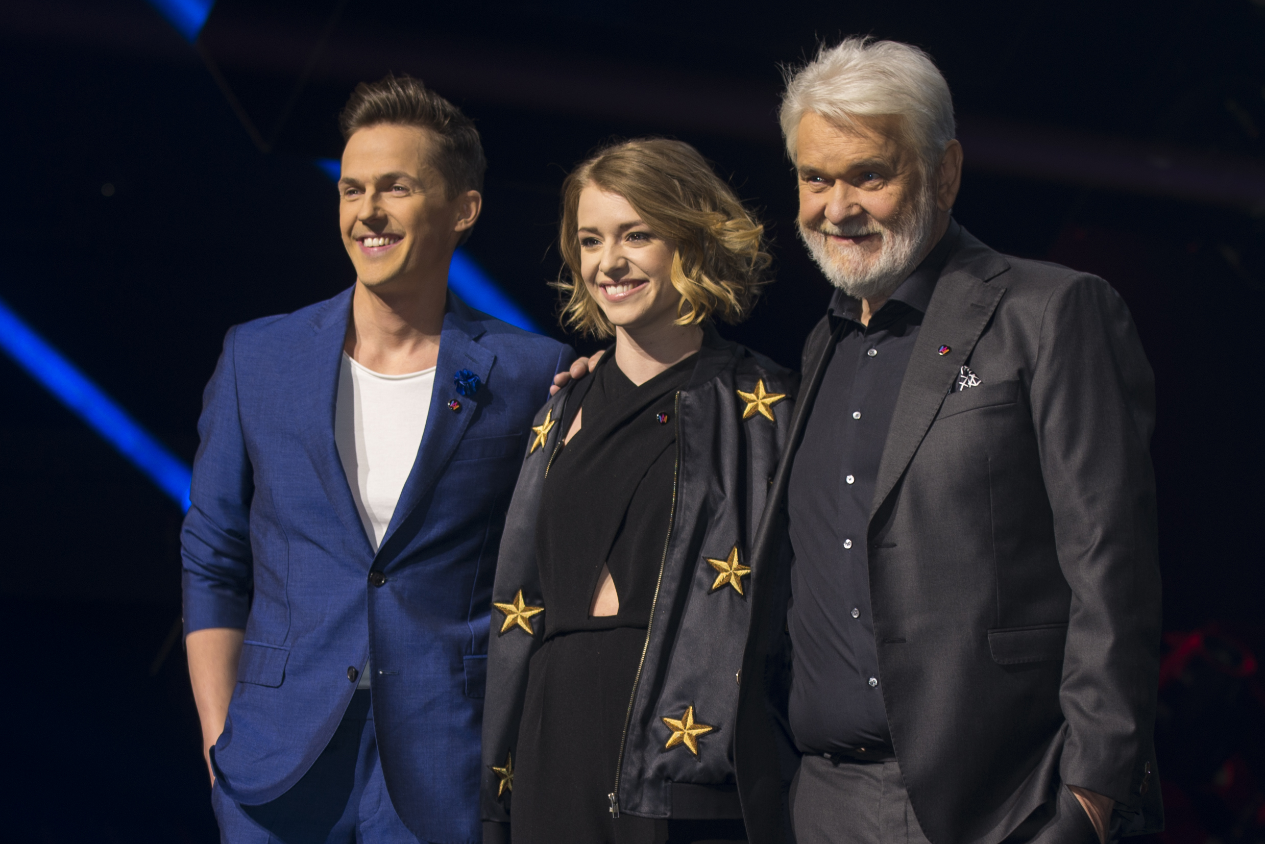 Programledarna för Melodifestivalen 2017. Här på en presskonferens inför första deltävlingen i Göteborg. David Lindgren, Clara Henry, och Hasse Andersson.